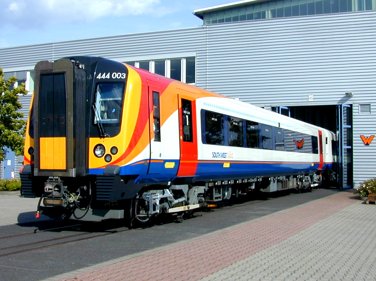 South West Trains treinstel van de serie 444 003 bij het Siemens testcentrum te Wegberg-Wildenrath.